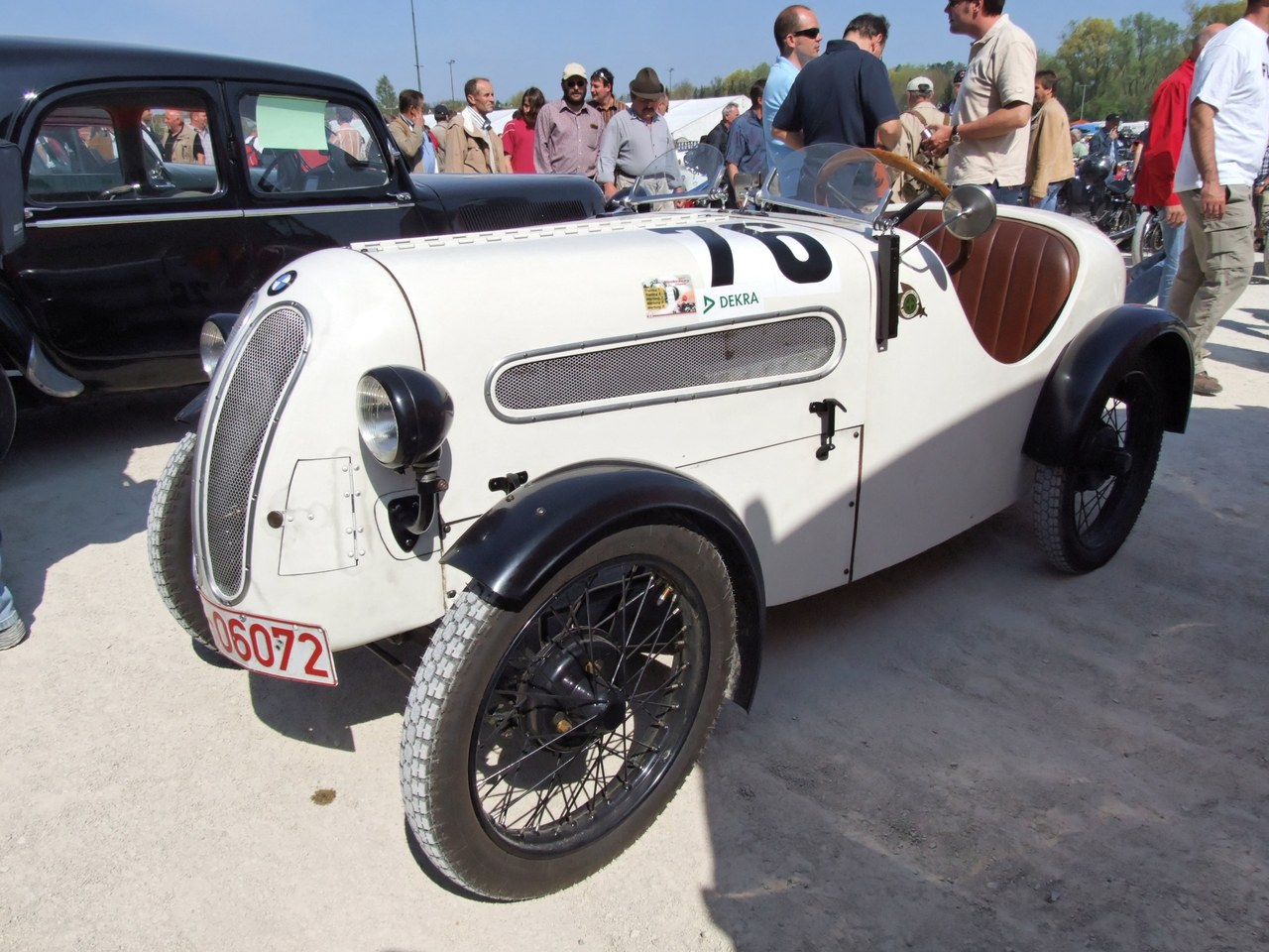 Quelle: selbst fotografiert, 04/2007 Fotograf: Späth Chr.